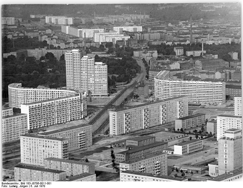 Berlin, Leninplatz, Wohnblocks, Plattenbauten Zentralbild Ludwig-6.7.70 Berlin: Blick auf den Leninplatz-Ein beliebtes Ziel der Berliner und Ihrer Gäste ist der Fernsehturm im Zentrum der DDR-Hauptstadt. Vom Telecafe bietet sich dem Besucher aus luftiger Höhe ein interessanter Blick auf den Leninplatz und die zahlreichen repräsentativen Bauten und Sehenswürdigkeiten.